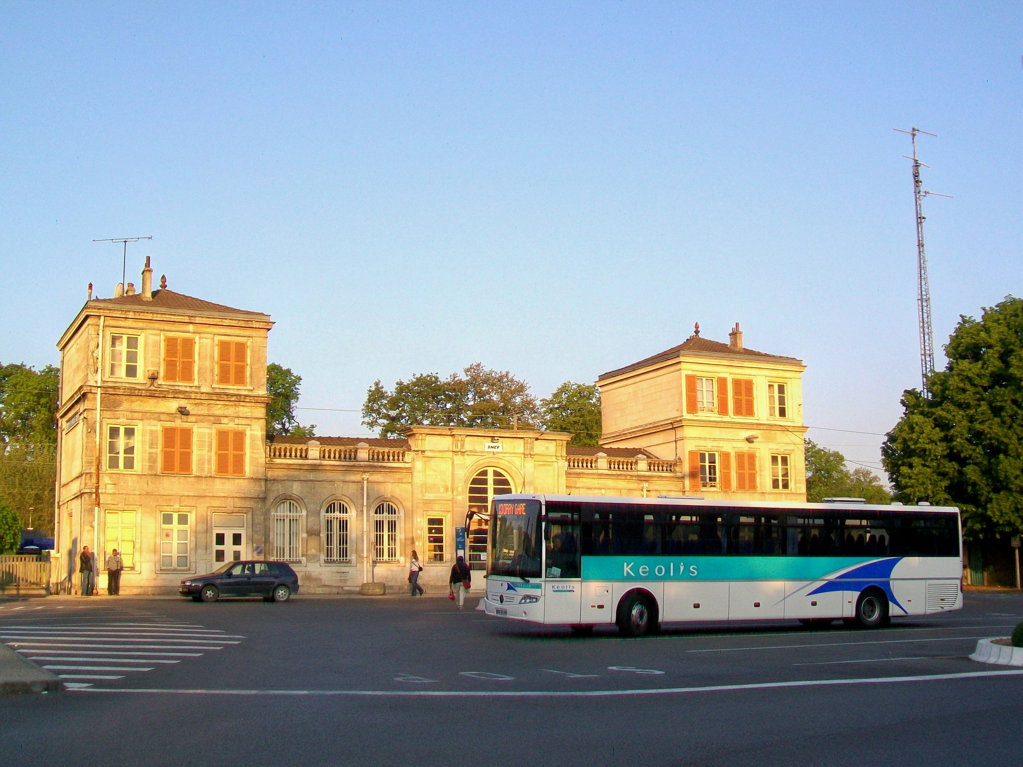 Correspondances avec des autocars du réseau départemental Sud-Oise (RDSO) exploité par Kéolis, sur la place de la gare d'Orry-la-Ville (lignes 13 et 15).